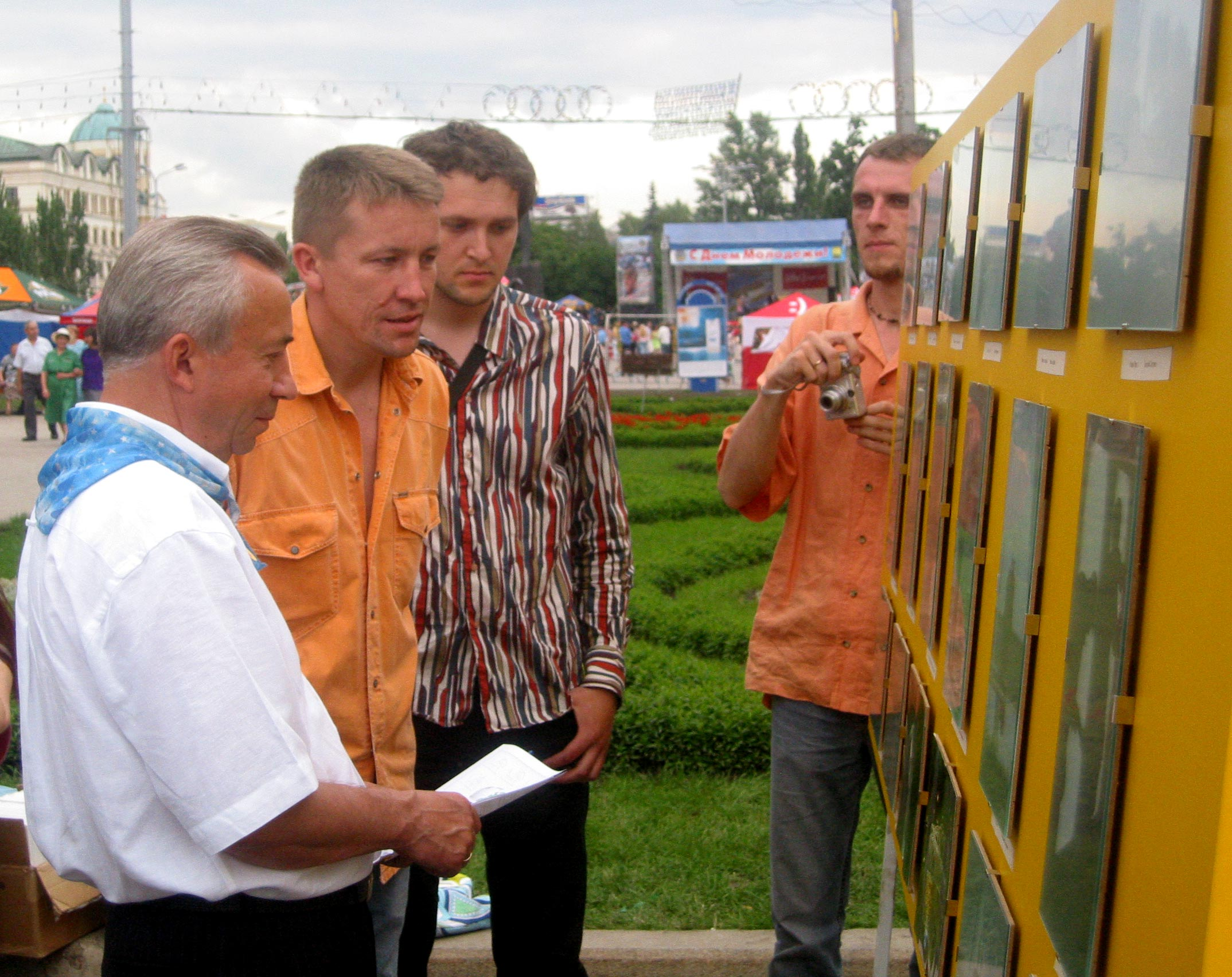 Мэр Донецка Александр Лукьянченко на выставке фотоконкурса «Я.МIСТО.ДОНЕЦЬК» 2005 г.